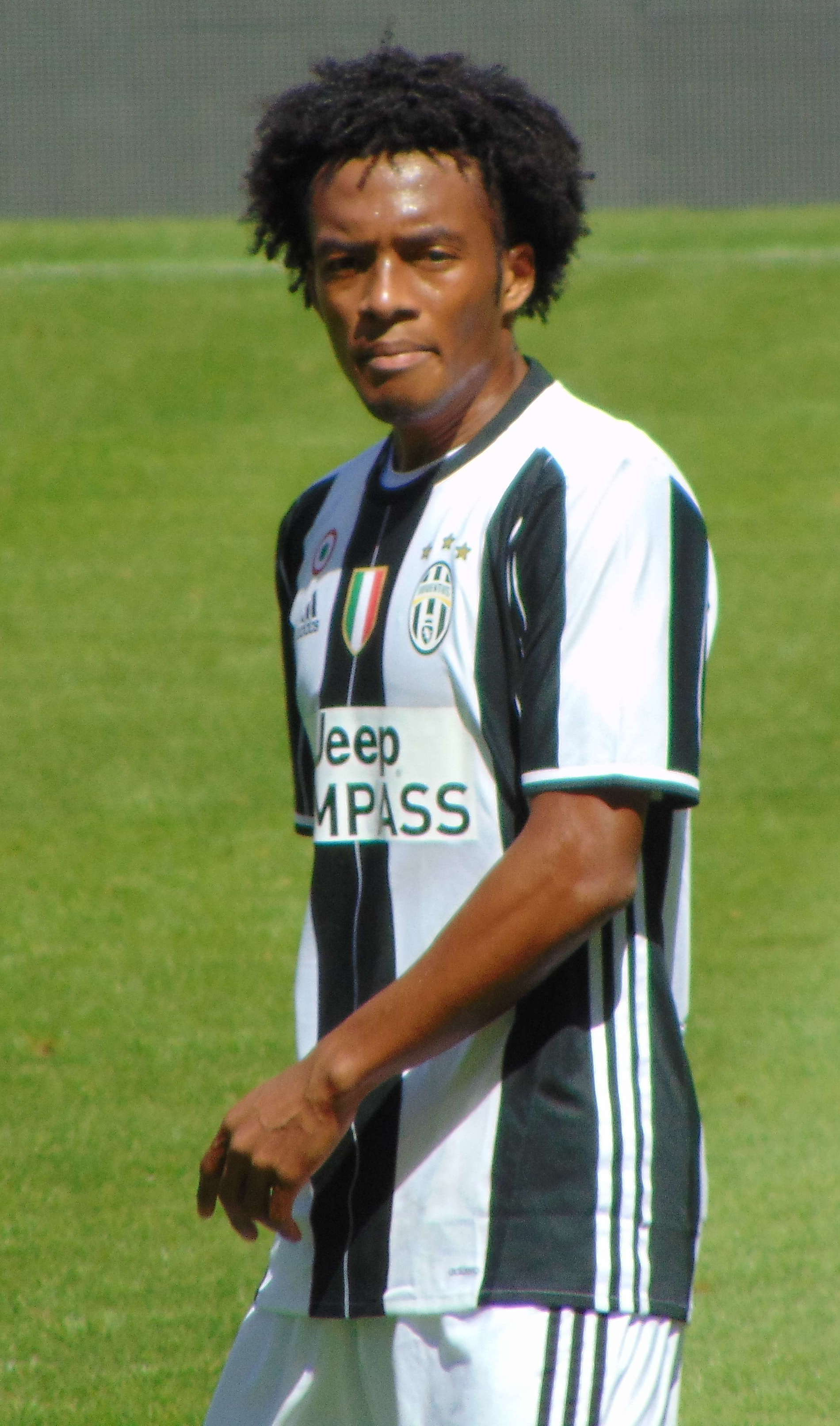 Torino, Juventus Stadium, 21 maggio 2017. Il calciatore della Juventus, Juan Cuadrado, nel corso della vittoriosa sfida interna contro il Crotone (3-0) valevole per la 37ª giornata del campionato italiano di Serie A 2016-17.